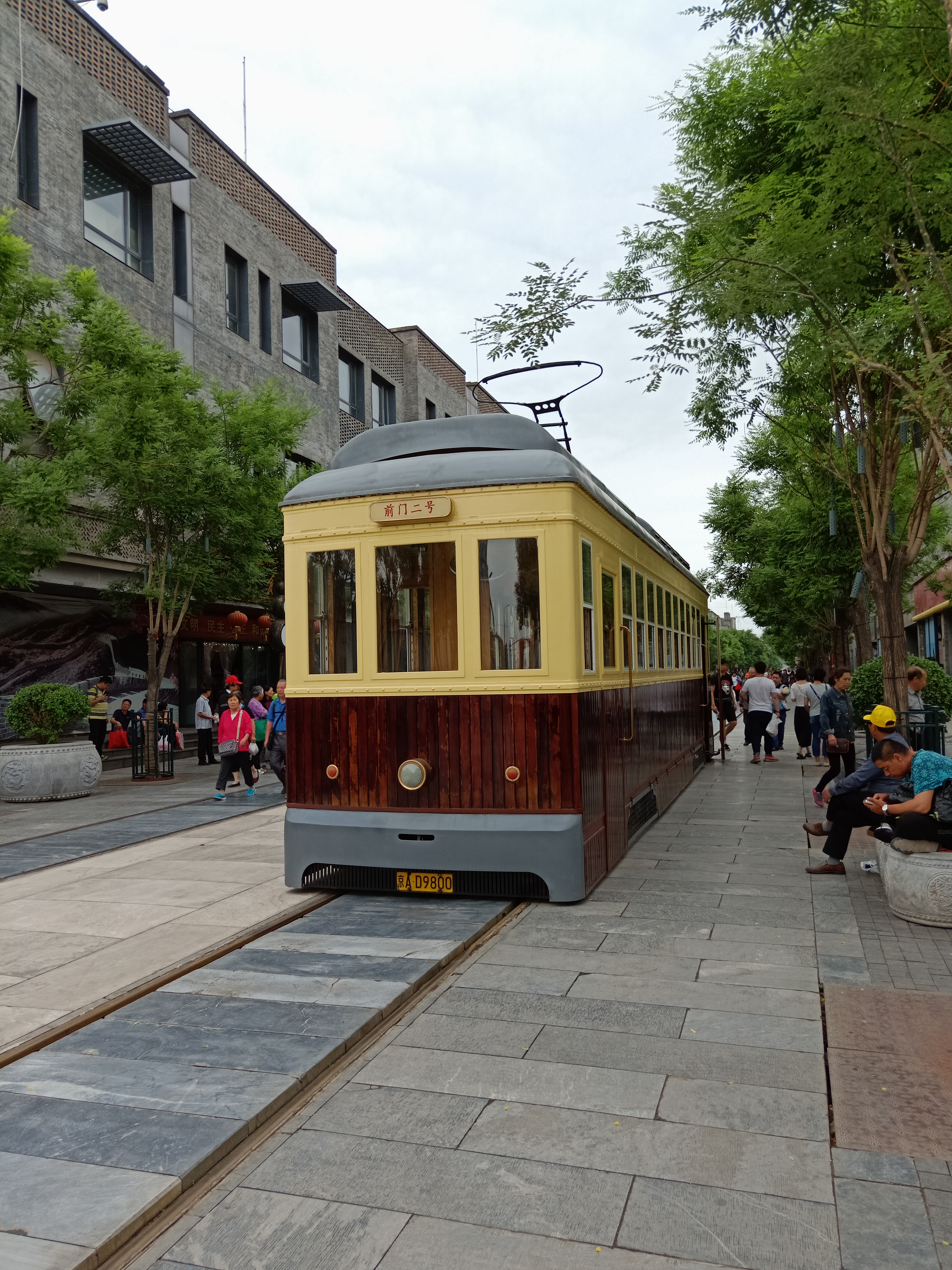 粵語: 喺前門步行街入面嘅叮叮車